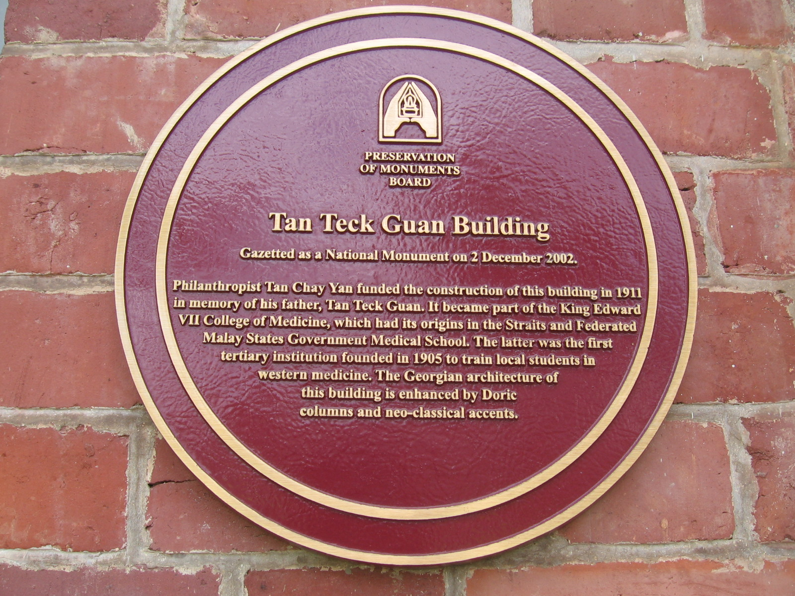 Tan Teck Guan Building